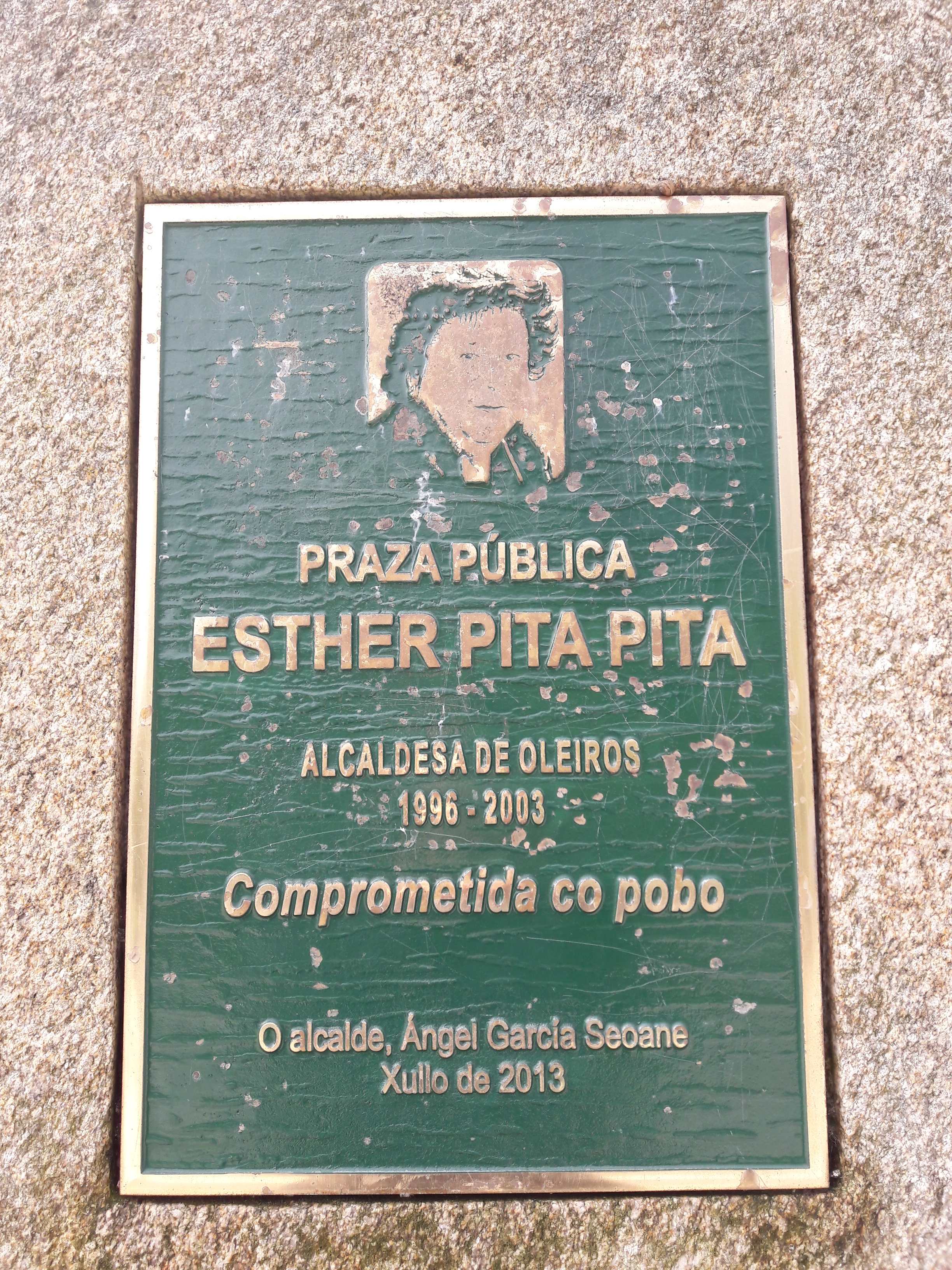 Placa de homenaxe a Esther Pita na praza do seu nome en Santa Cruz (Oleiros)